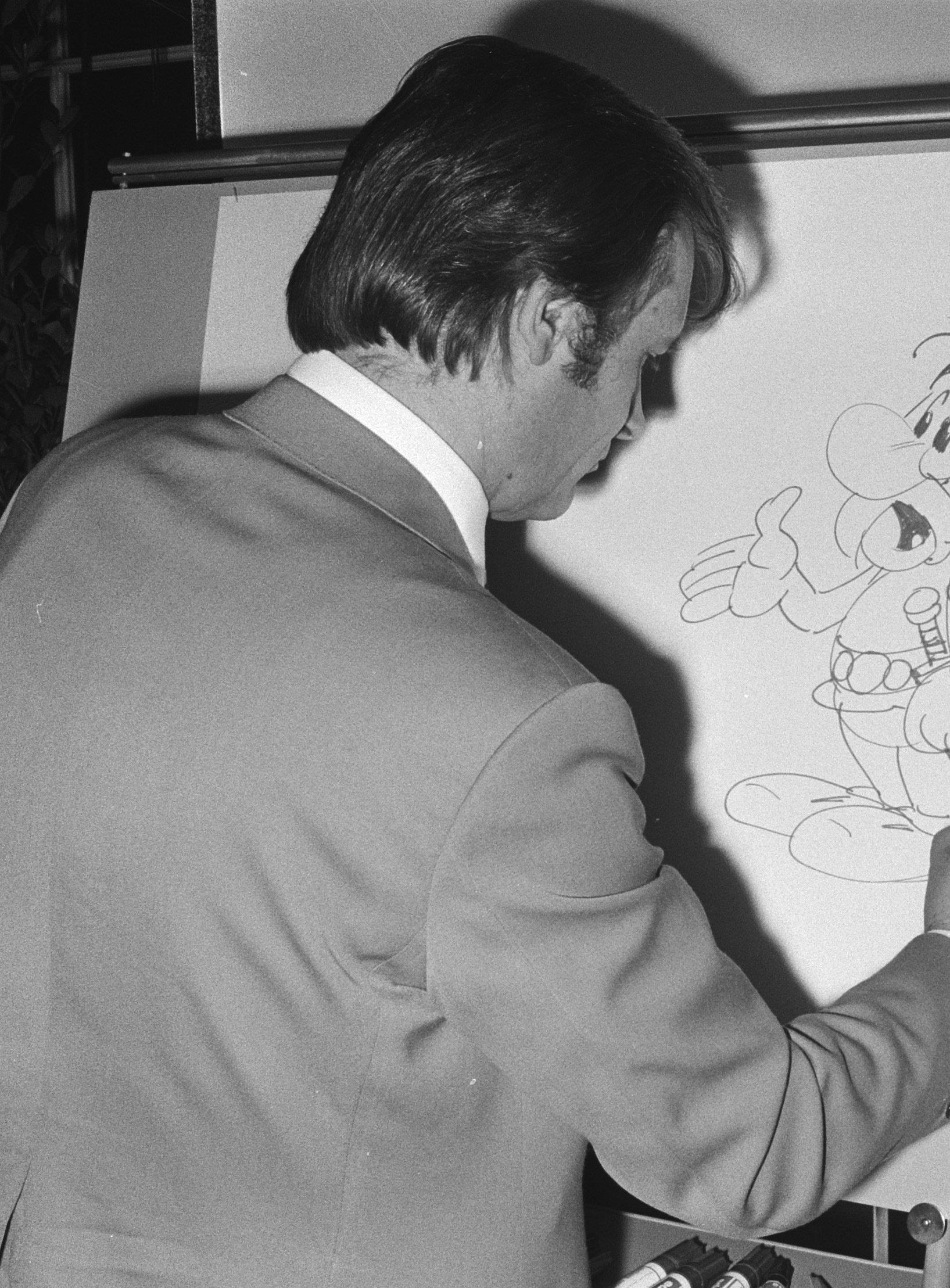 Albert Uderzo (de tekenaar van Asterix) tekent Asterix. De Bijenkorf, Amsterdam